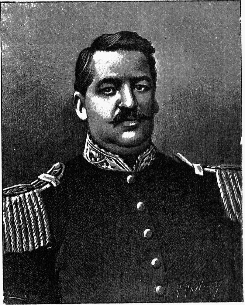 General de Division D. Isidoro Resquín, Comandante em Gefe de la izquierda paraguaya en la batalla de Tuyuty.